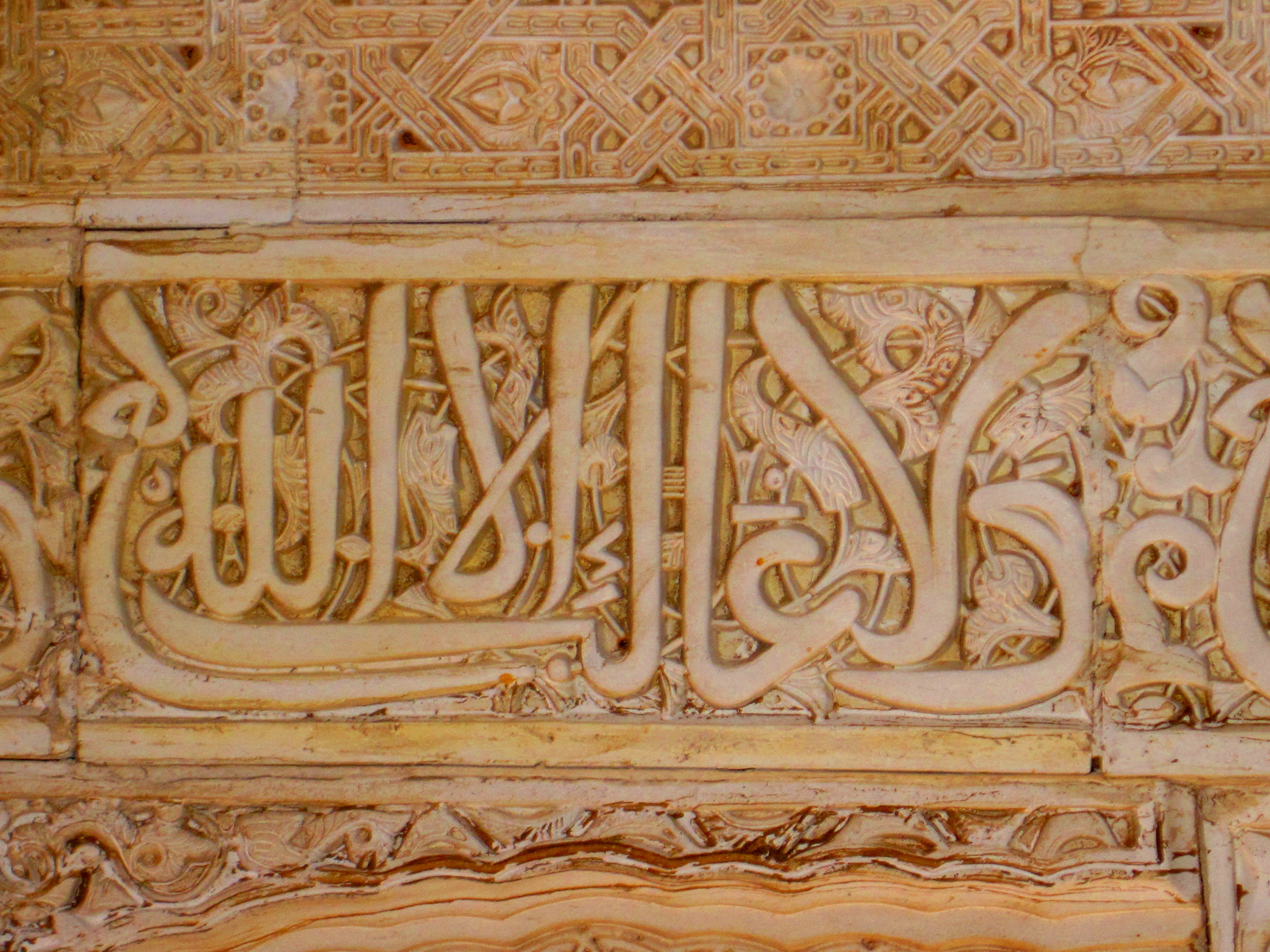 Sección 3.2.1.2 Sala de la Barca